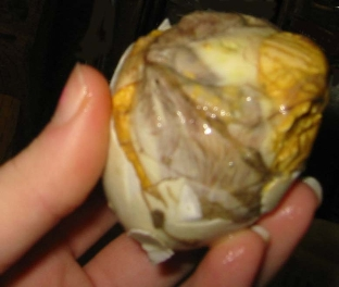 Balut egg